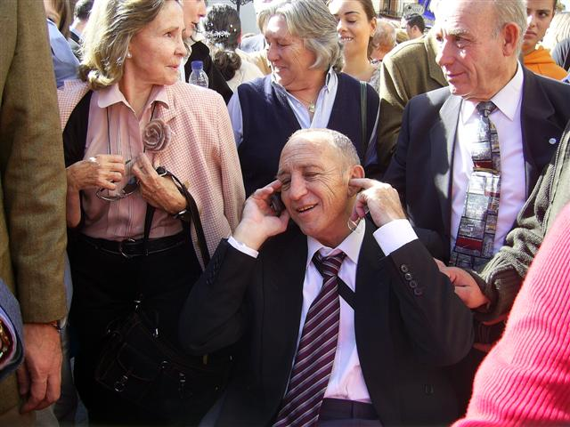 Paquito fernandez Ochoa